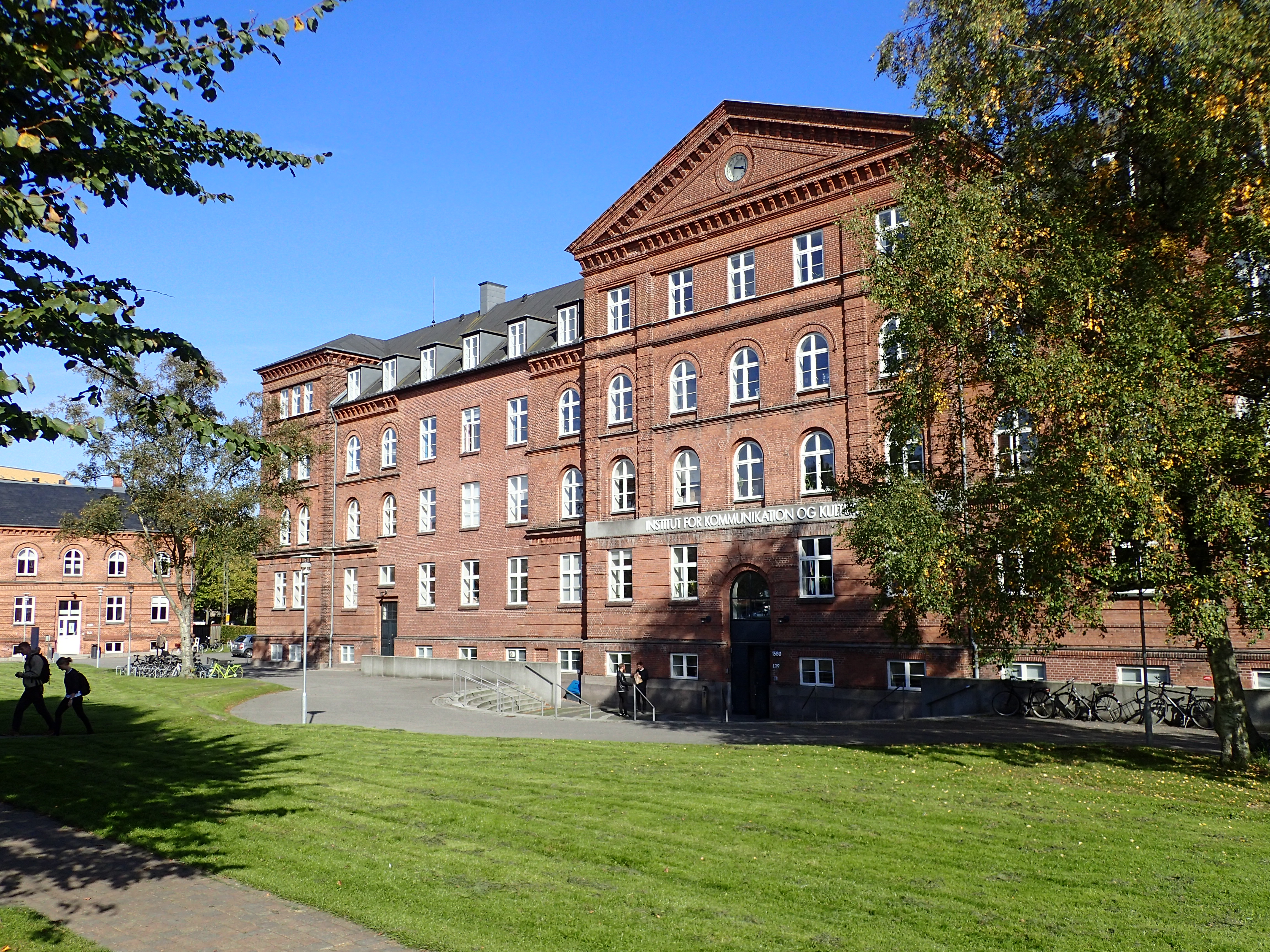 Langelandsgades Kaserne